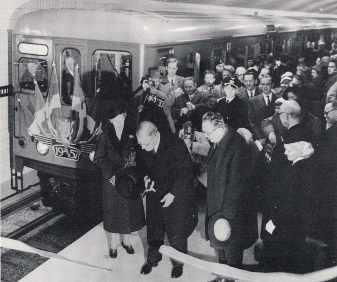 Invigning av T-Centralen i Stockholm av kung Gustav VI Adolf medan drottning Louise och borgarrådet Helge Berglund ser på.